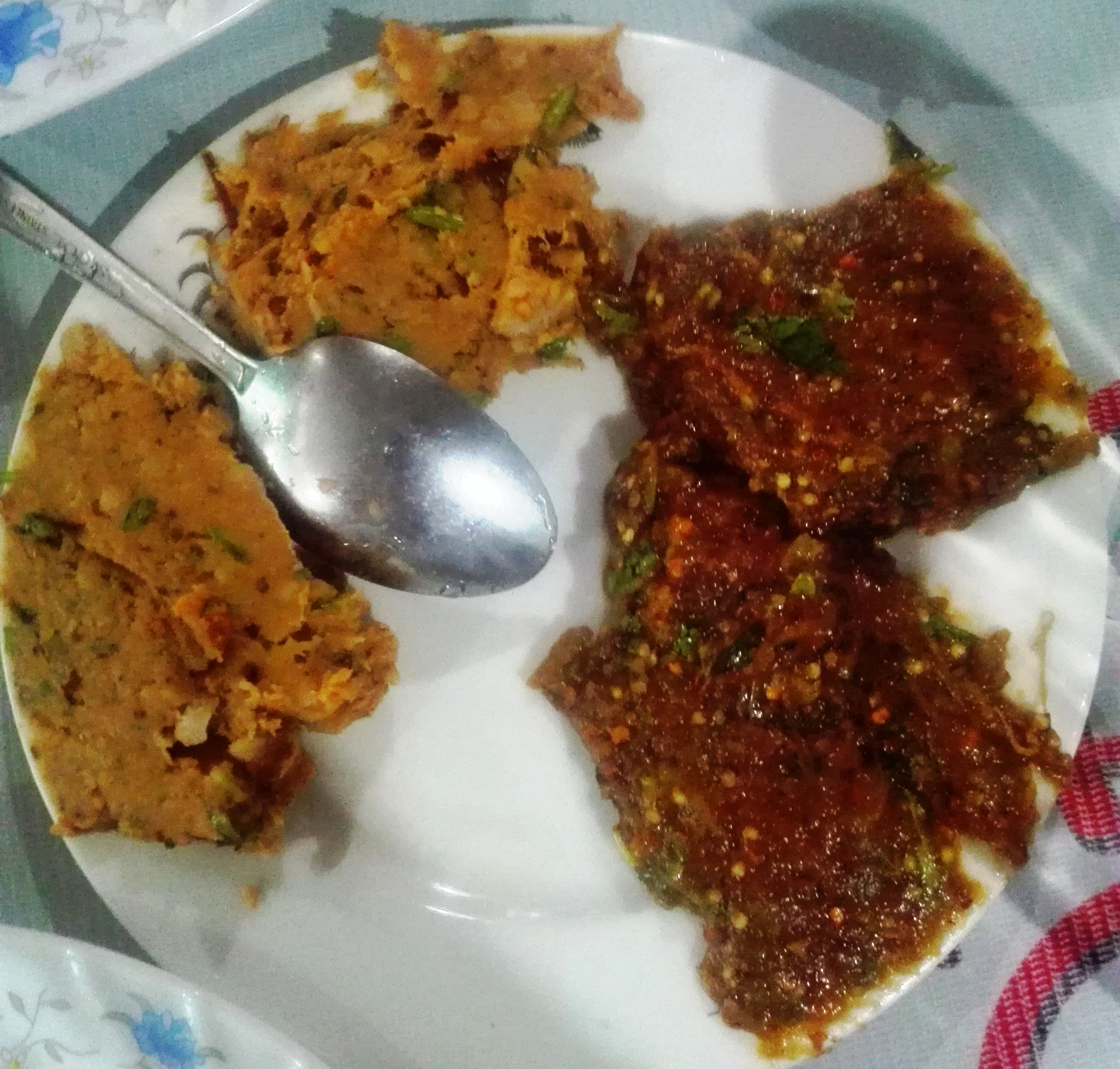 Alu vorta, kola vorta, begun vorta.